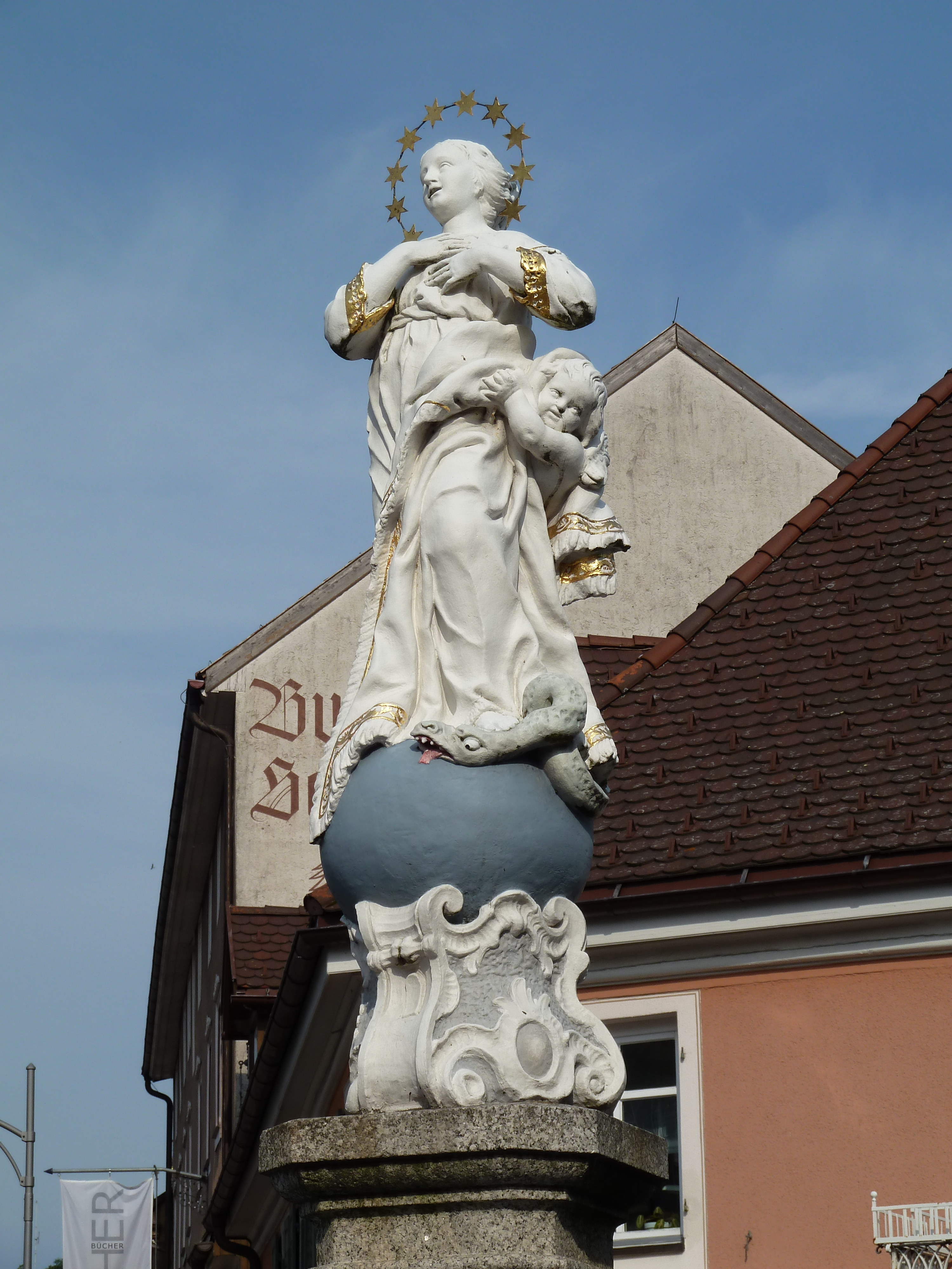 Der Bonndorfer Marienbrunnen, ein Überbleibsel des Paulinerklosters (sagt zumindest Franz Xaver Kraus, Josef Durm: Die Kunstdenkmäler des Grossherzogthums Baden (Band 3): Die Kunstdenkmäler des Kreises Waldshut, Akademische Verlagsbuchhandlung Mohr, Freiburg im Breisgau 1892, S. 8)